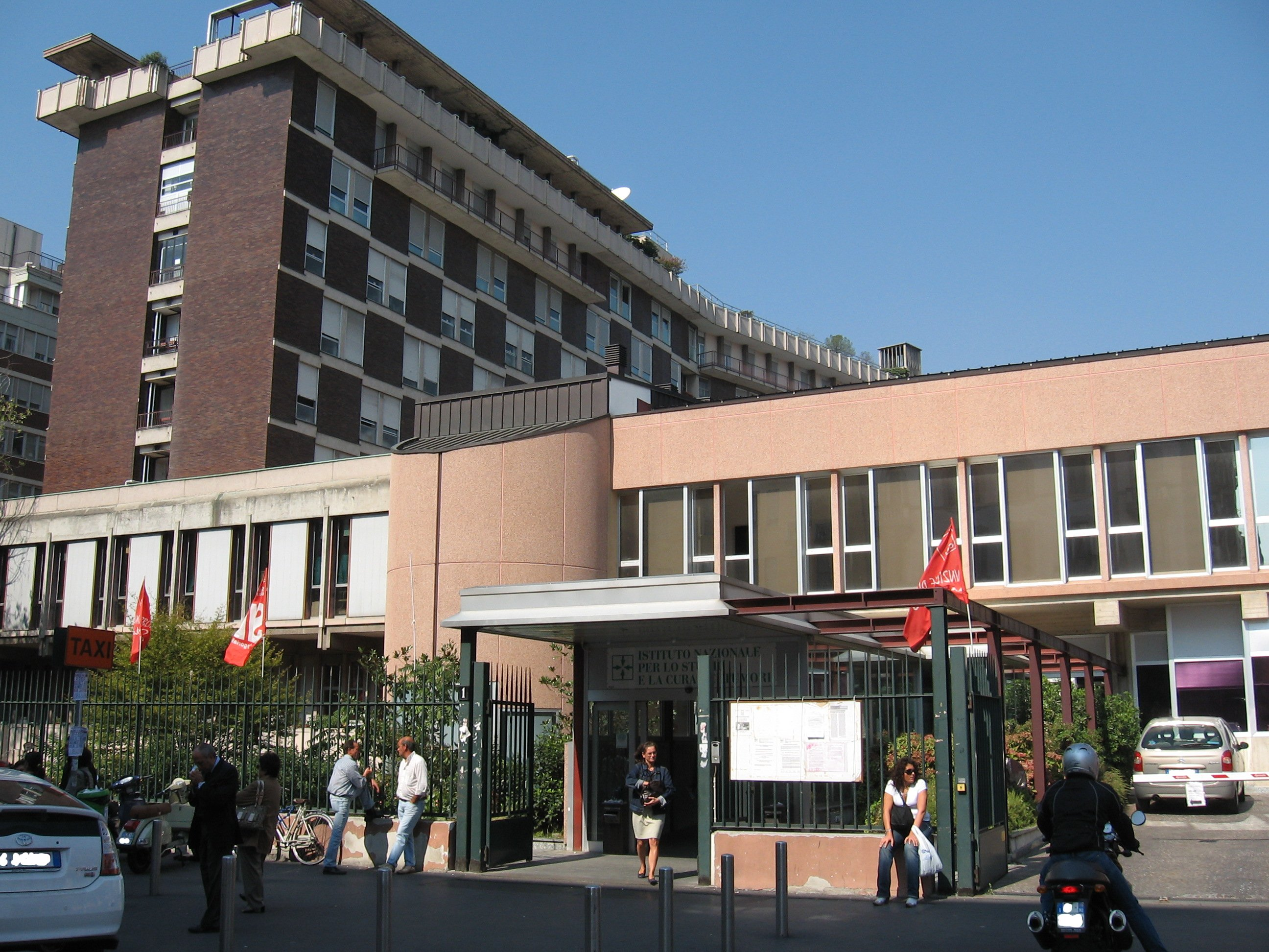 Istituto Nazionale per lo Studio e la Cura dei Tumori, Milano